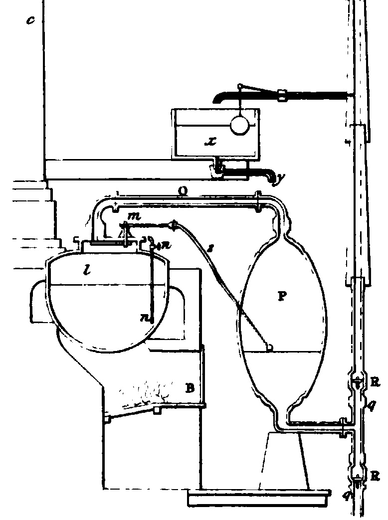 トマス・セイヴァリによる蒸気機関の断面図